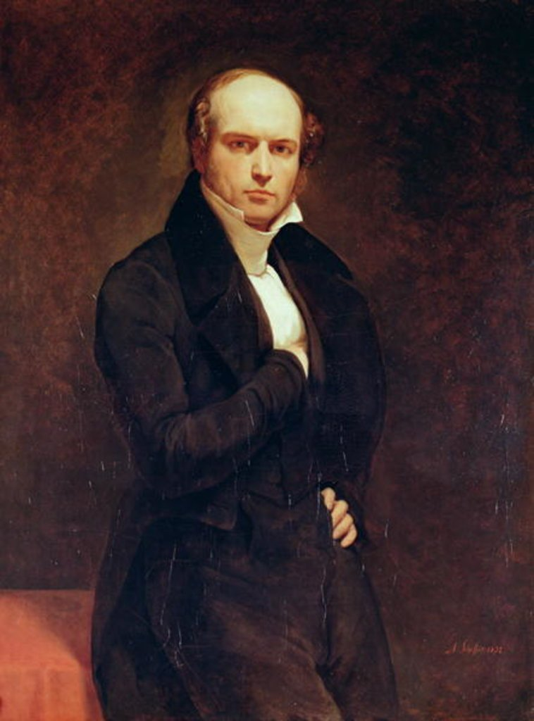 Portrait d'Odilon Barrot, huile sur toile d'Scheffer, Paris, Palais Royal.